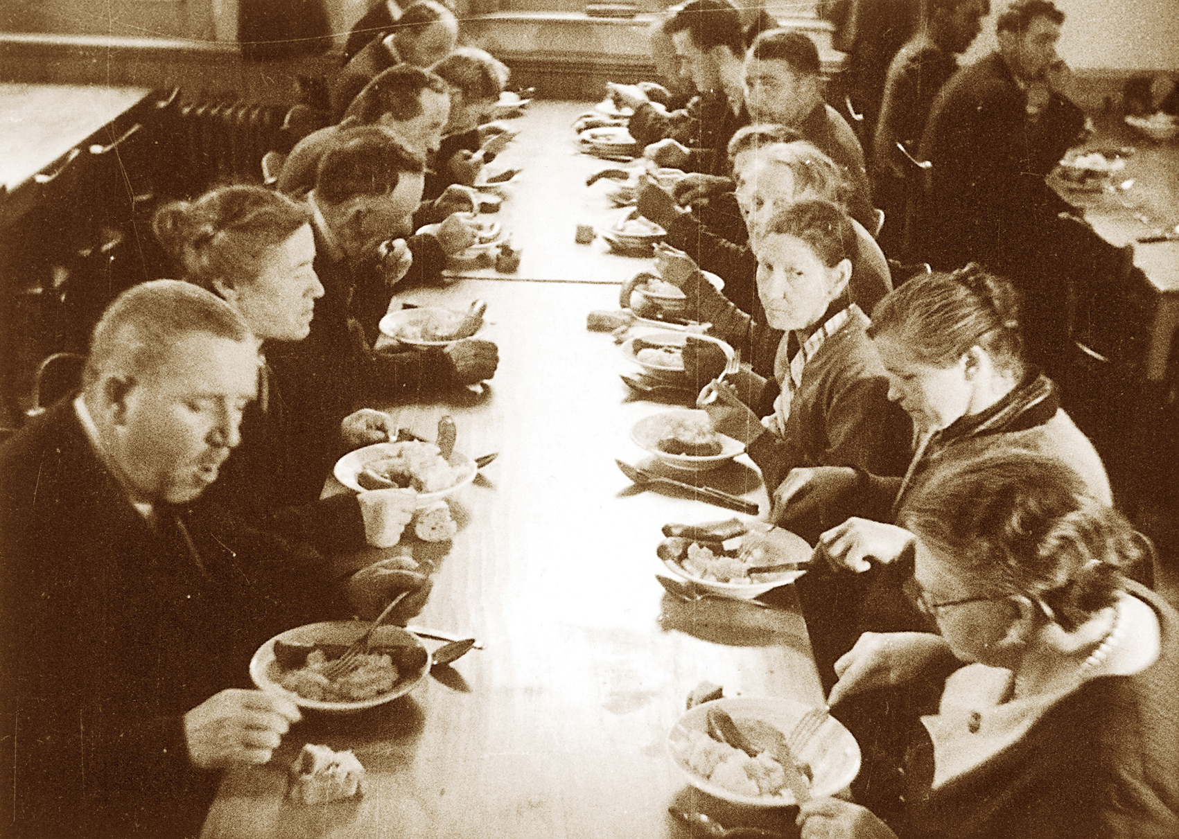 Winterhilfe Schweiz gründete und unterstützte in den 30er- und 40-Jahren Suppenküchen